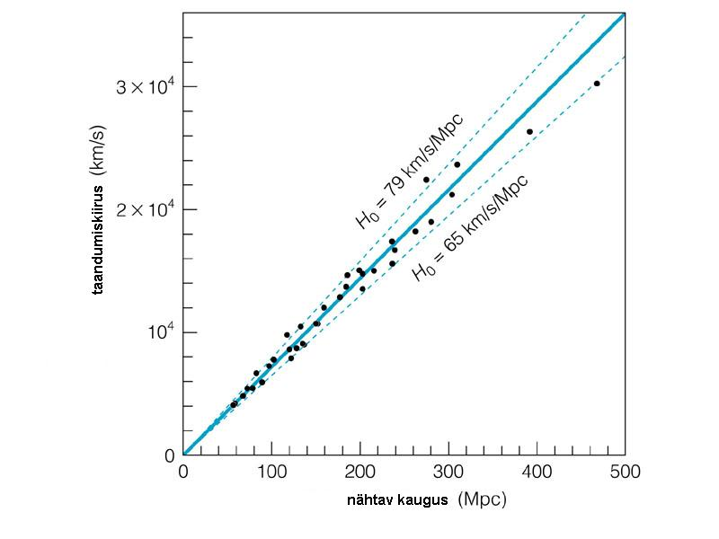 Punanihke suurus ja kaugus vaatlejast